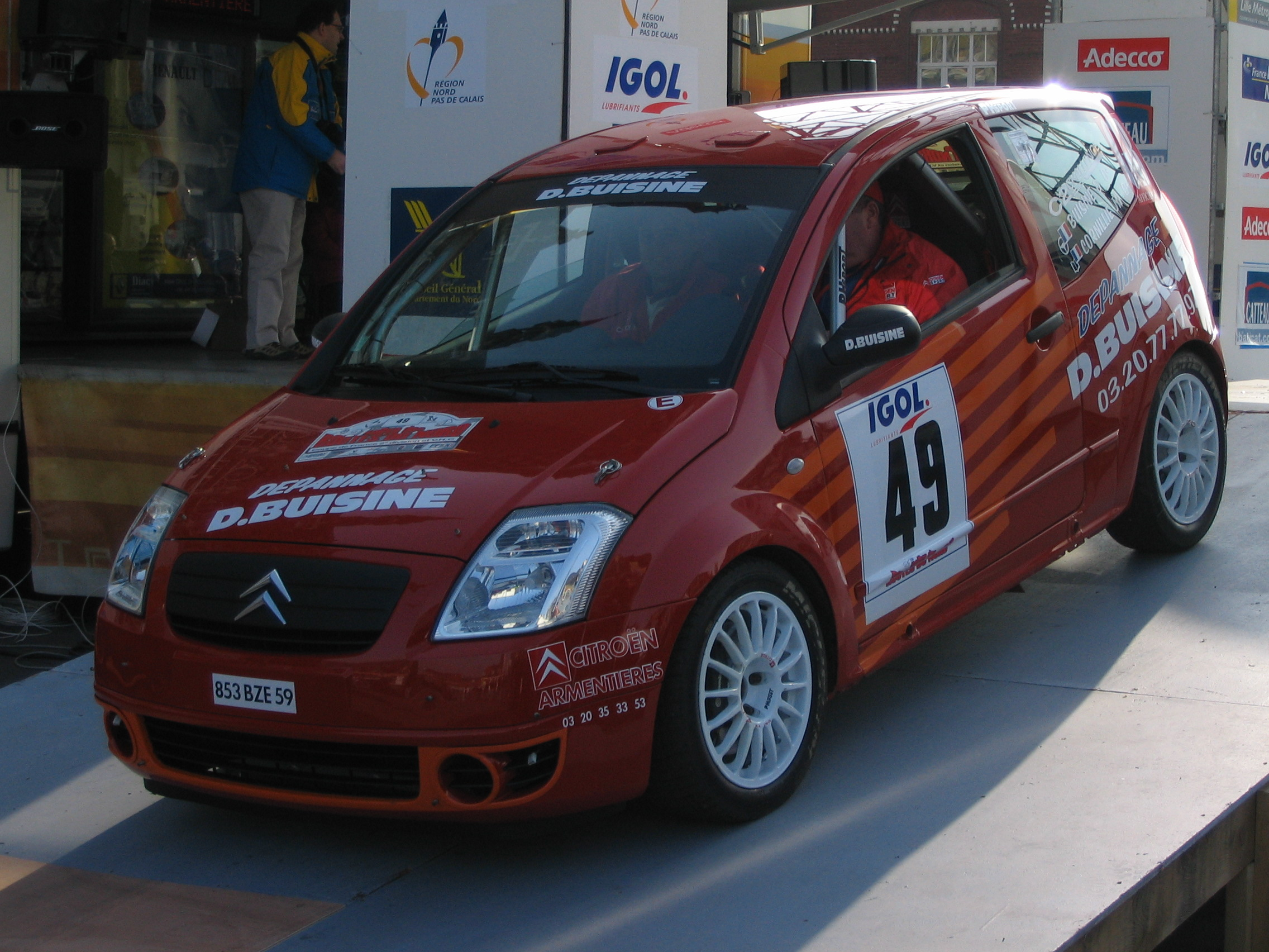 Citroën C2 sur le podium de départ, Armentières, 22e rallye des routes du Nord (25 & 26 février 06).